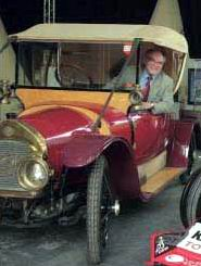 Motiv: Fafnir auf der CAR in Aachen Ort: Aachen Freigegeben durch den Fotografen: Michael Jaspers von der "Aachener Zeitung"